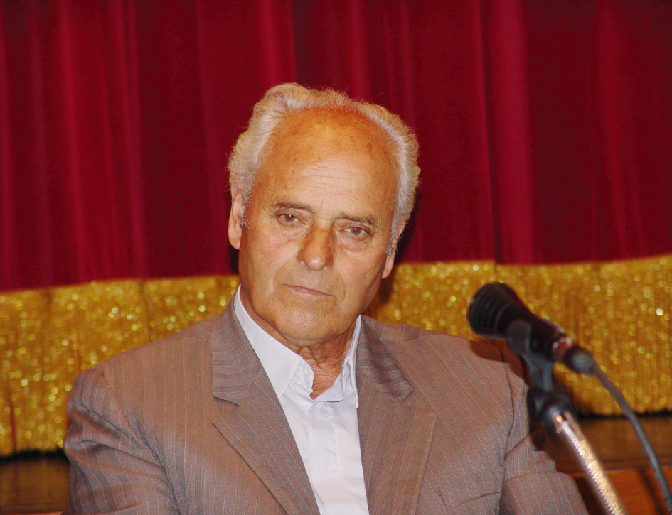 Јордан Костадинов Иванов, македонски национален деец од Пиринскиот дел на Македонија, борец за националните права на Македонците под Бугарија